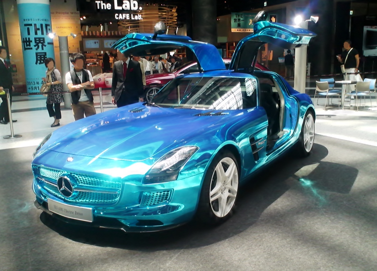 C197型メルセデス・ベンツSLS AMGエレクトリックドライブをフロントから撮影。